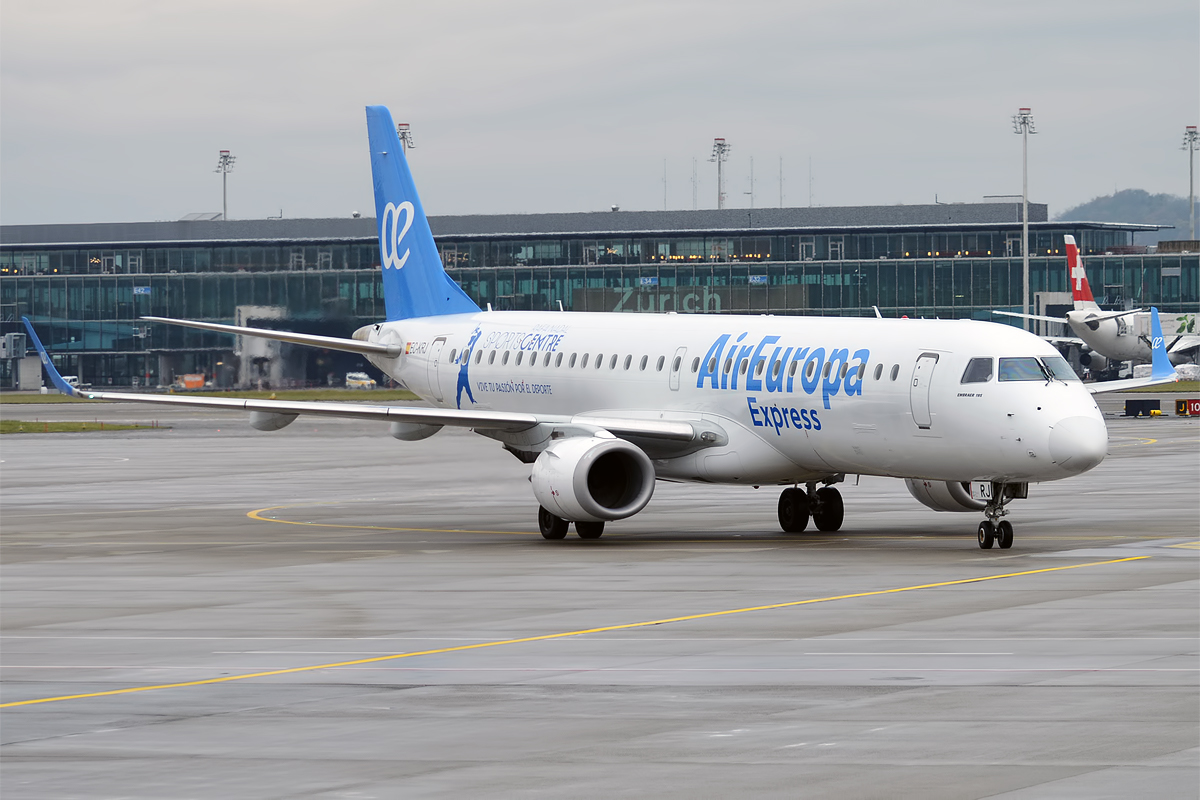 Air Europa Express, EC-KRJ, Embraer ERJ-195LR